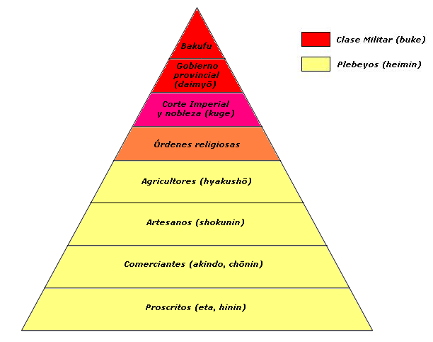 Estructura de la sociedad japonesa en el Shogunato Tokugawa. Source / origen